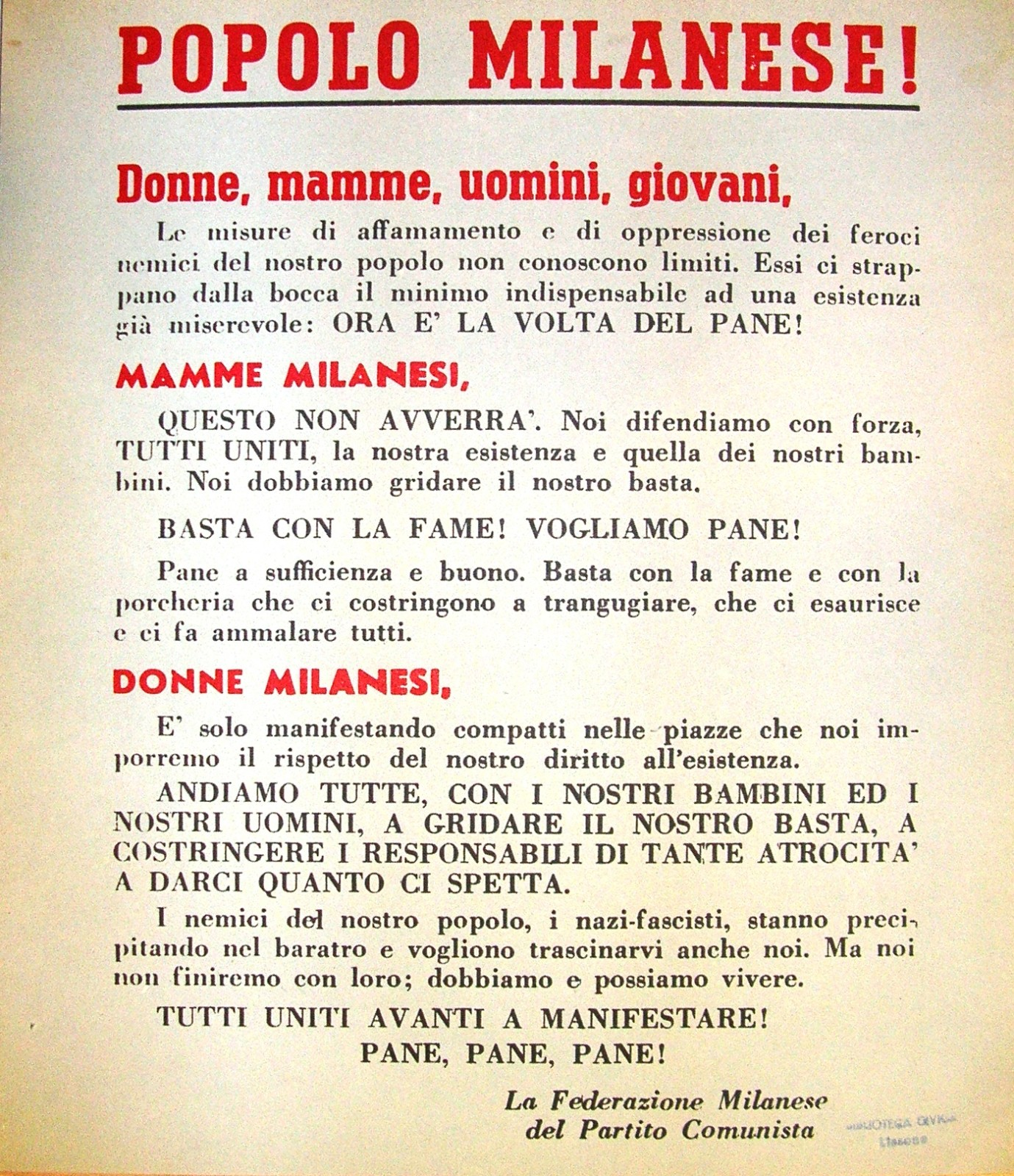 Manifesto clandestino del PCI Milanese per la mobilitazione generale.